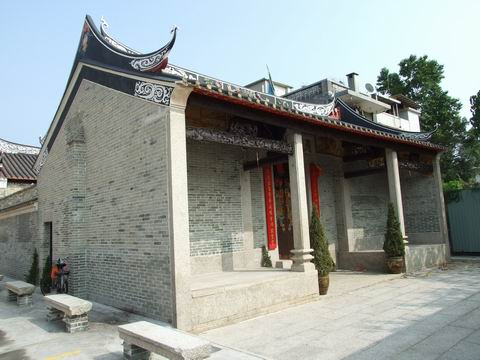 廖顯承堂